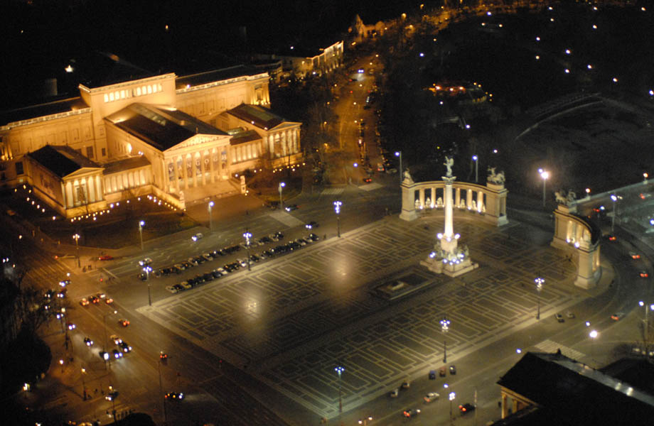 Hősök tere éjszaka - Budapest - Hungary - Europe